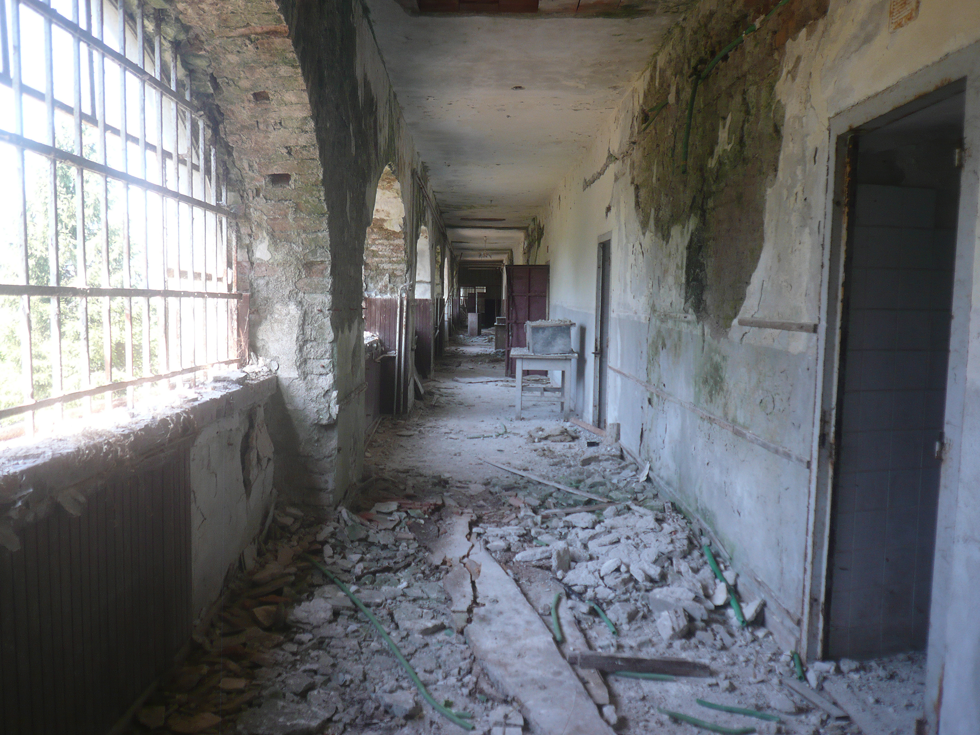 Im Zellenblock des ehemaligen Gefängnisses Stara Gradiska